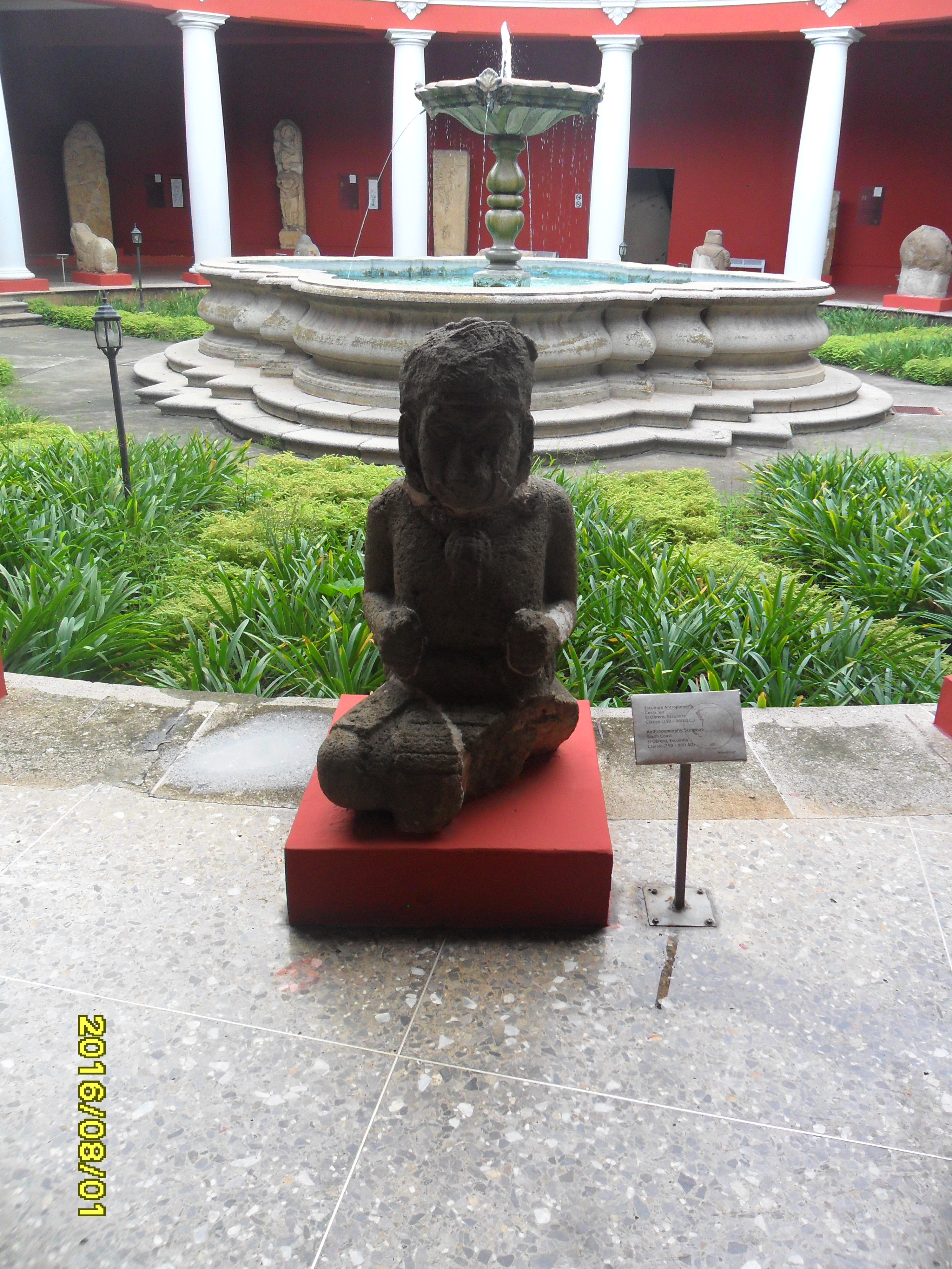 Escultura antropomorfa El Obrero, Escuintla, en Museo Nacional de Arqueologia y Etnologia de Guatemala